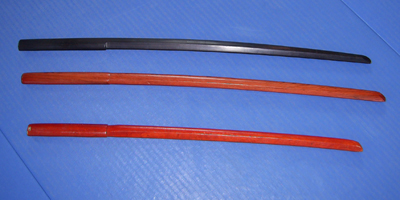 Boken of mokgeom. Houten oefenzwaarden gebruikt in Koreaanse en Japanse krijgskunsten.